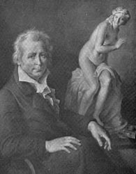 Б. Ш. Митуар. ПОРТРЕТ Ф. Ф. ЩЕДРИНА. 1813.